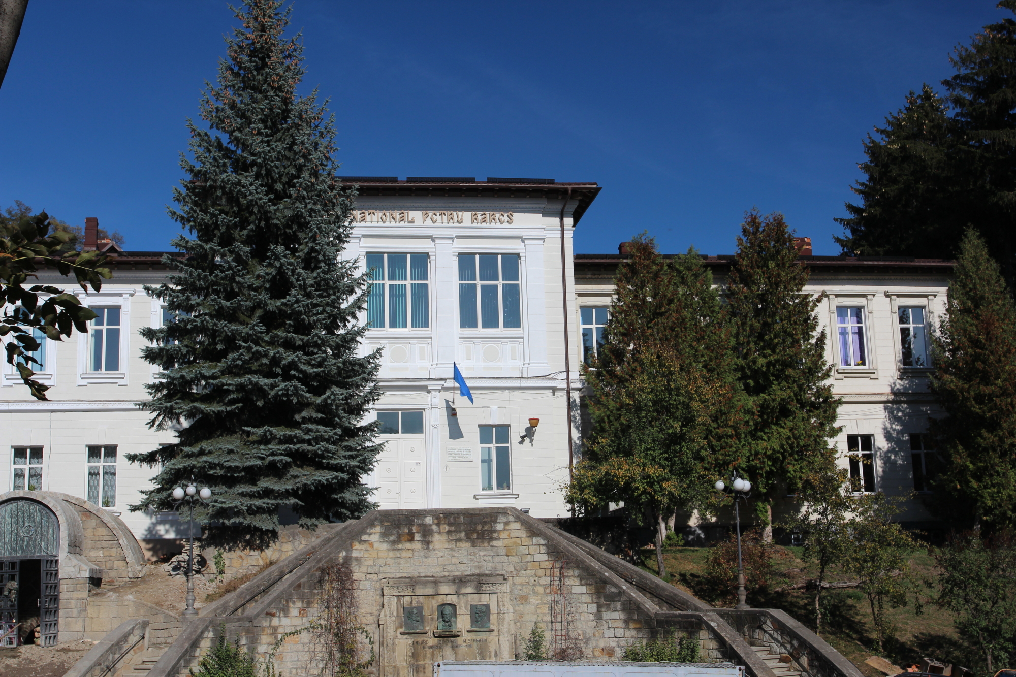 Colegiul Național "Petru Rareș"